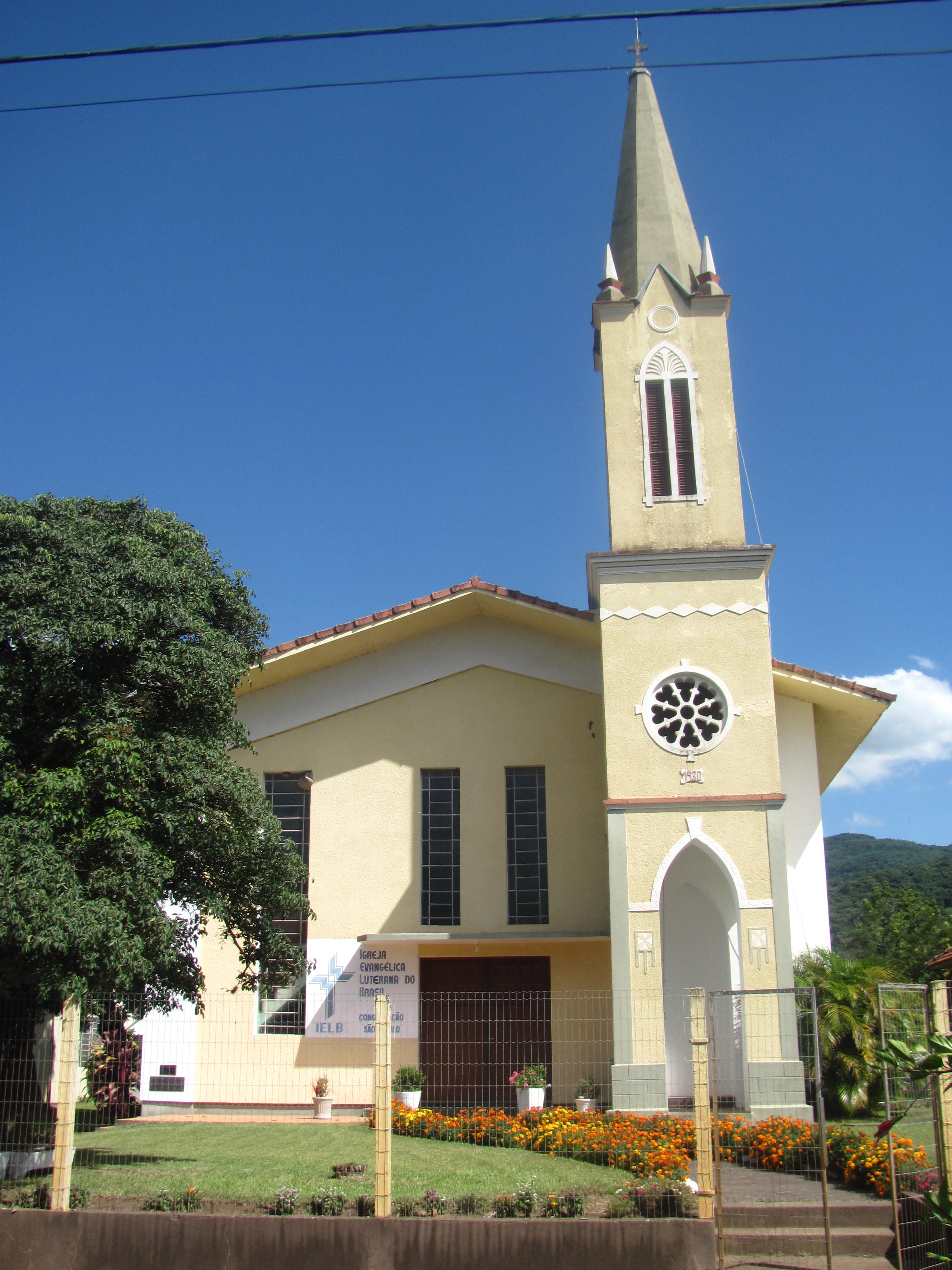 IELB Congregação São Paulo em Rolante